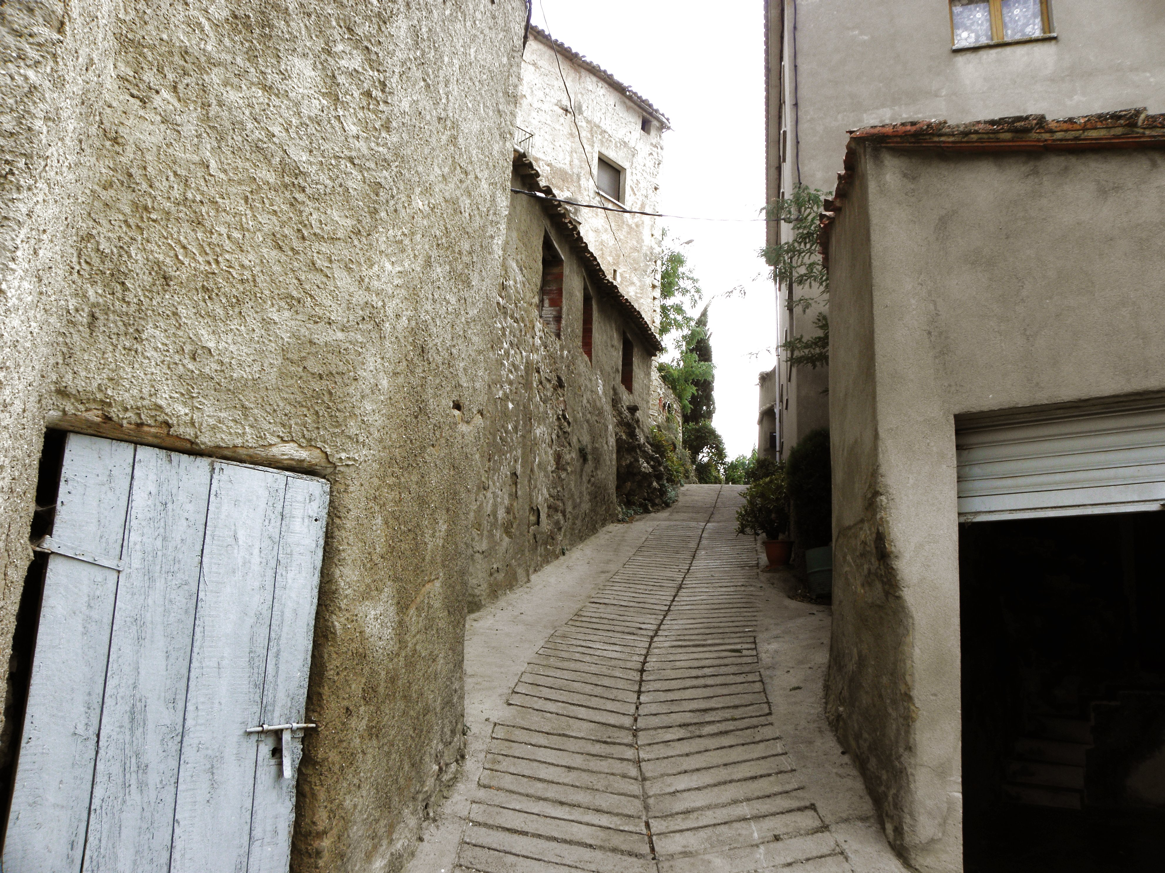 Enfesta (La Molsosa, Solsonès). Carrer